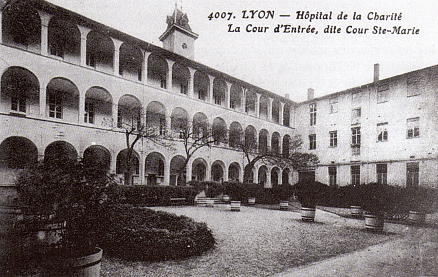 cour d'entrée de l'hôpital de la Charité à Lyon.